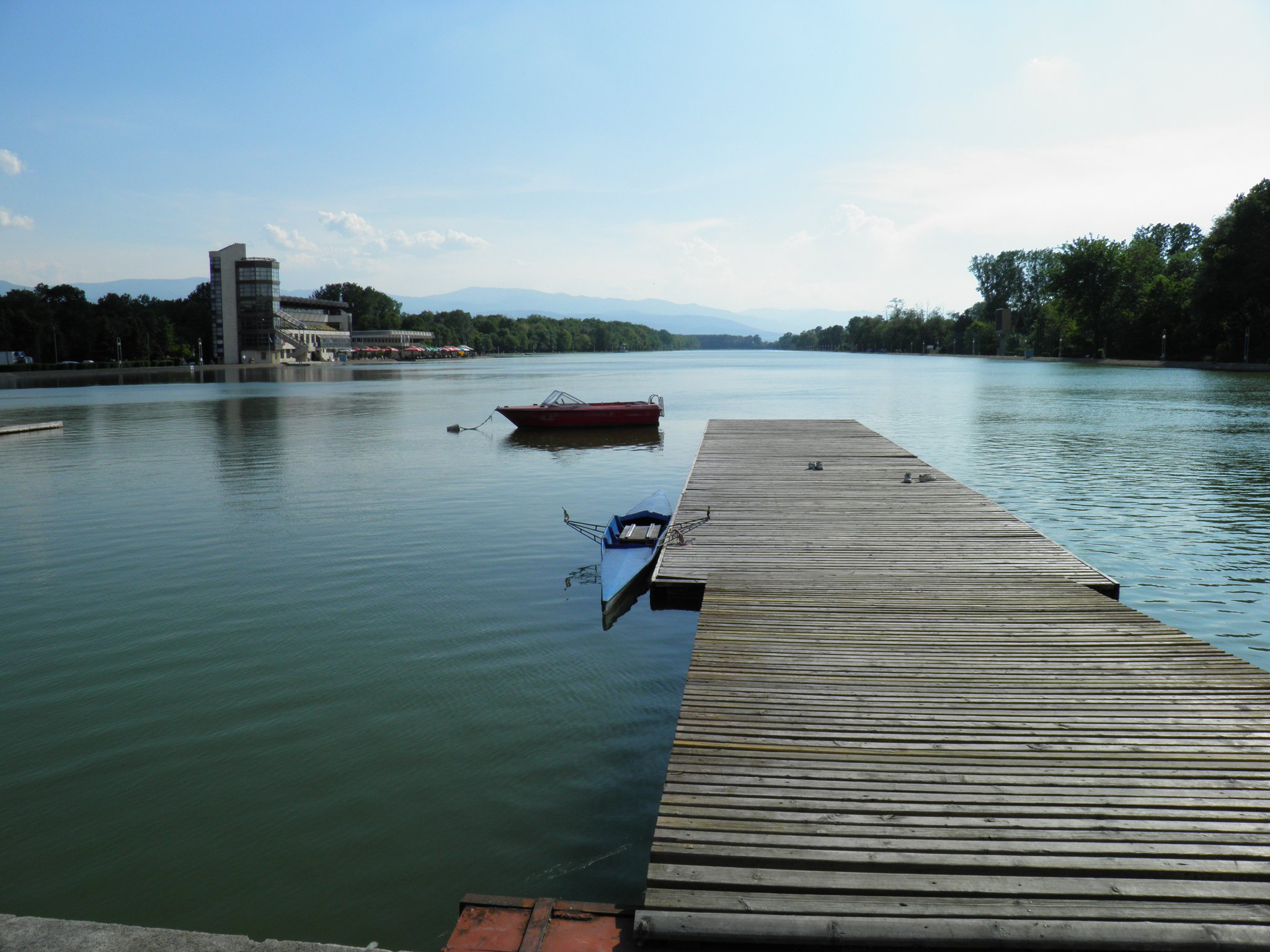 Кеят на Гребна база Пловдив